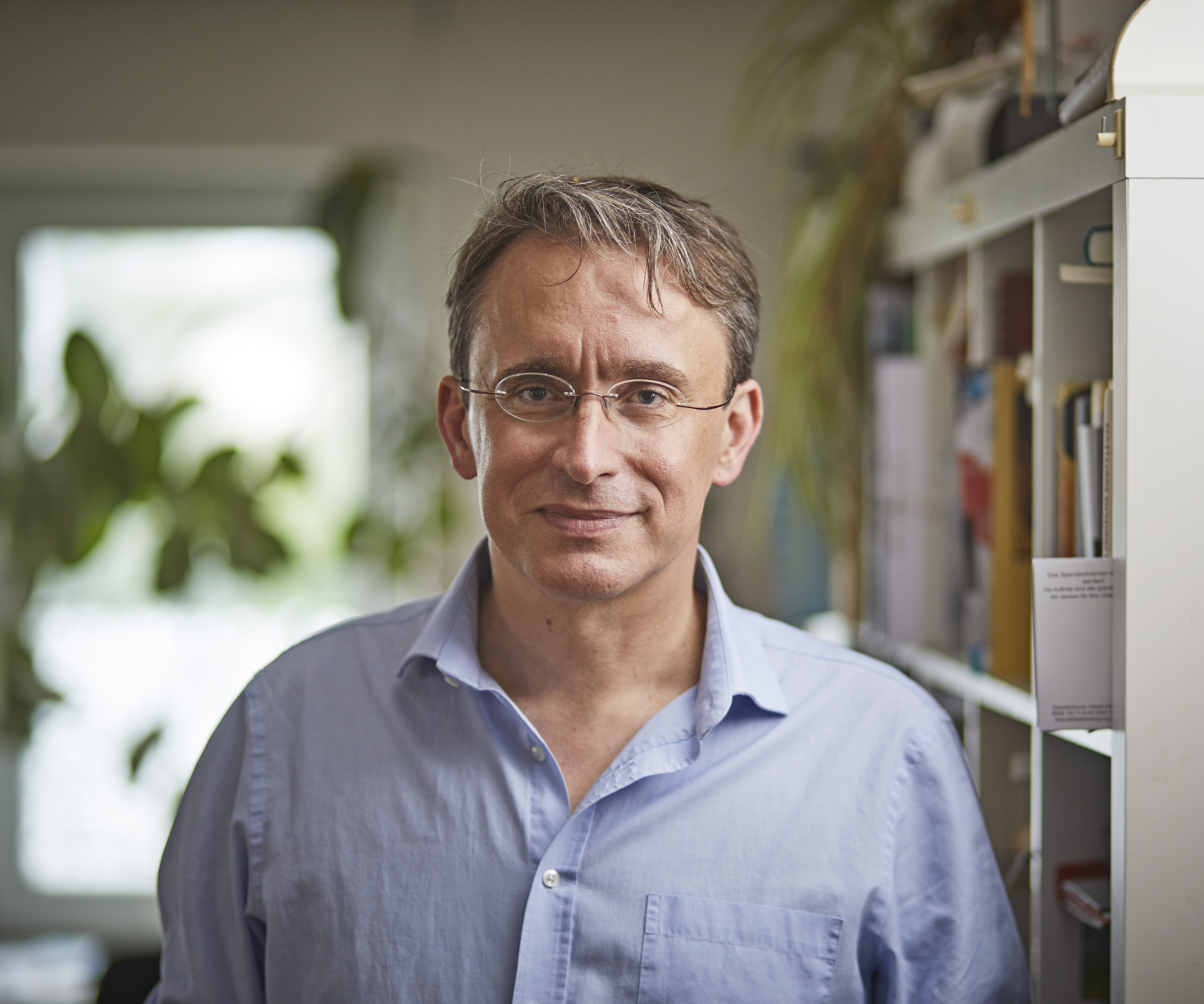 Aktuelles Foto von Thomas Schuler